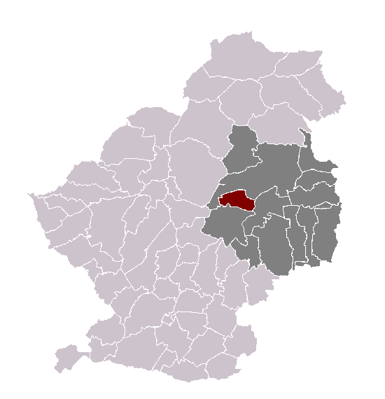 Vred dans son canton et son arrondissement